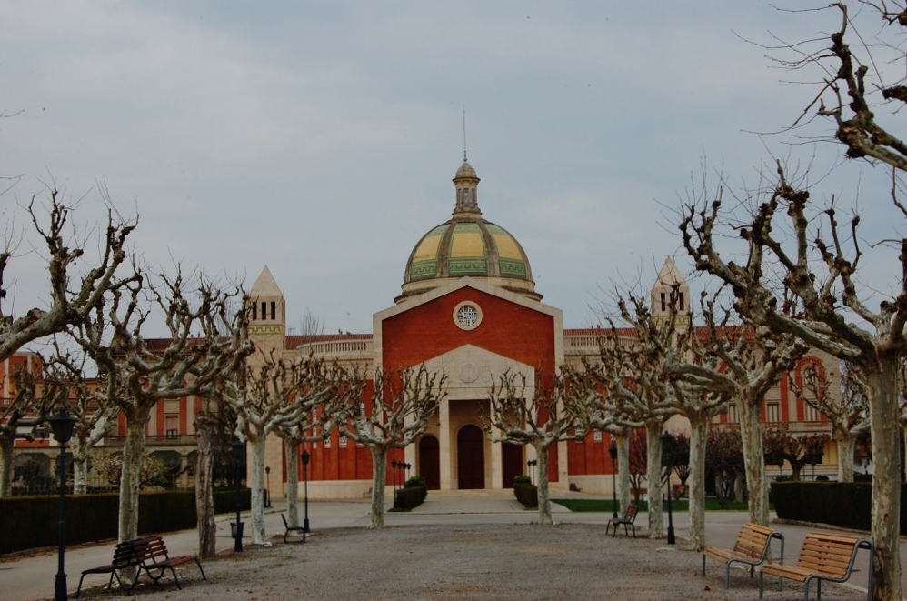 Residència Mare Ràfols (Vilafranca del Penedès)